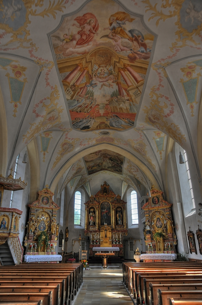 Innenaufnahme Kirche von Frasdorf